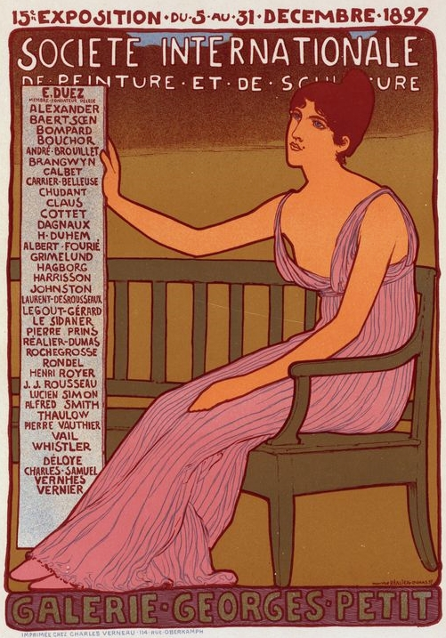 Affiche de Maurice Réalier-Dumas (1860-1928) pour la 15e exposition de la Société internationale de peinture et de sculpture à la galerie Georges Petit à Paris en 1897.